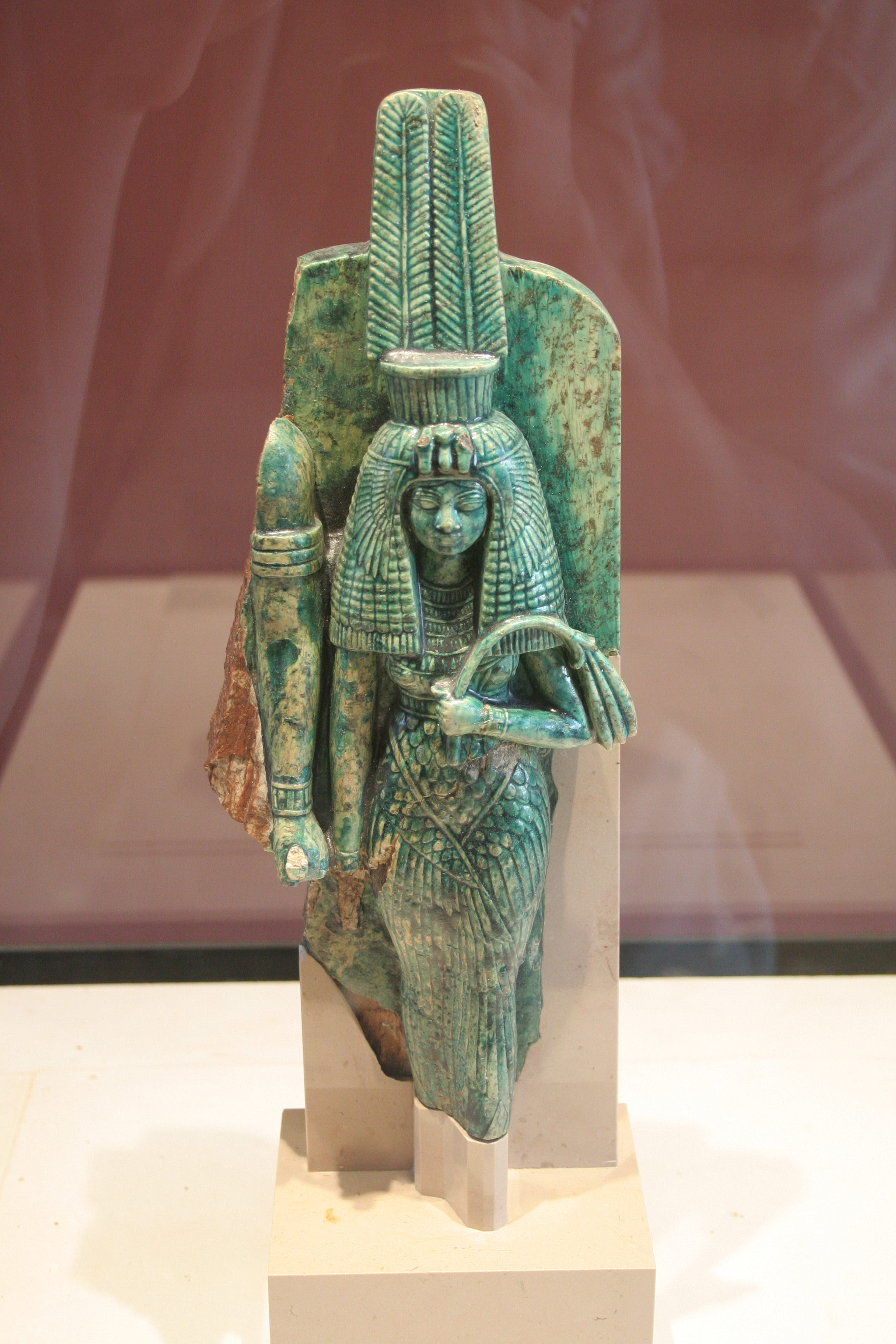 La reine Tiy aux côtés du roi Aménophis III (stéatite glaçurée)